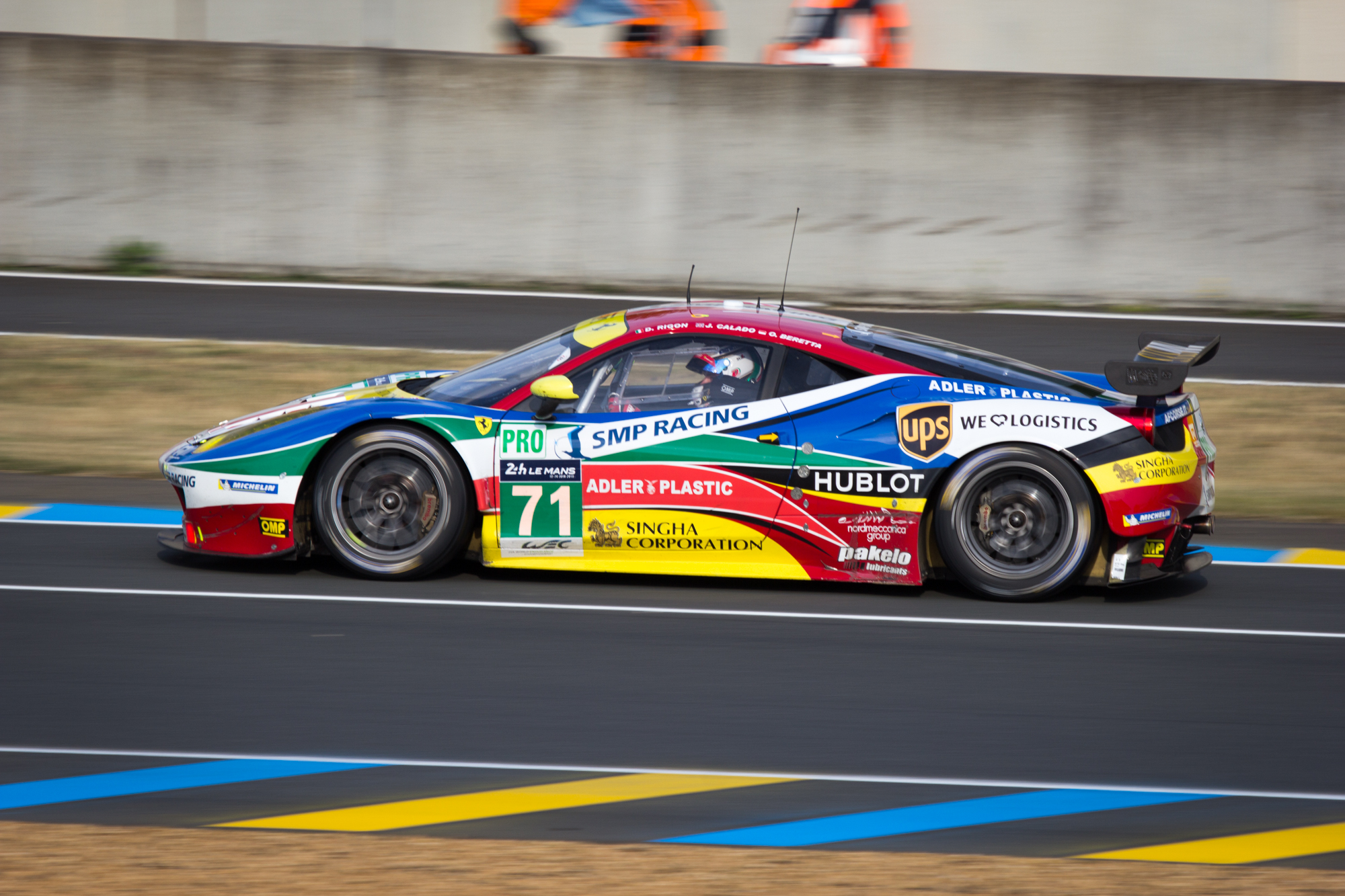 Drivers: Giammaria Bruni, Toni Vilander, Giancarlo Fisichella